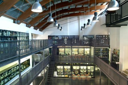 Deposito visitabile nel Museo regionale della ceramica di Deruta